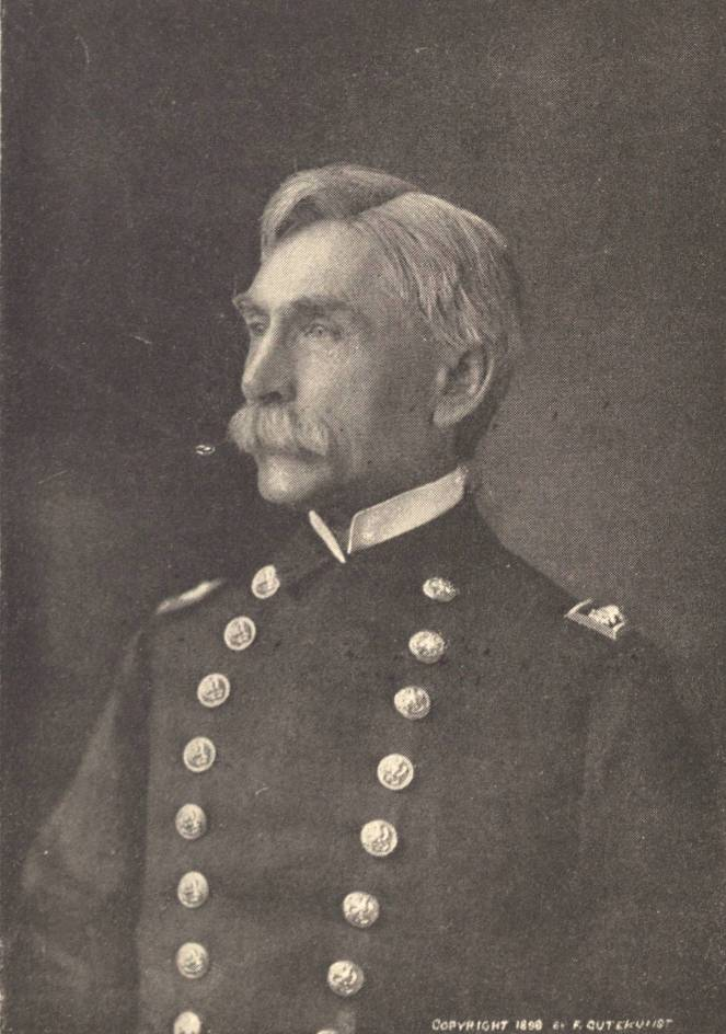 Rear-Admiral John Crittenden Watson